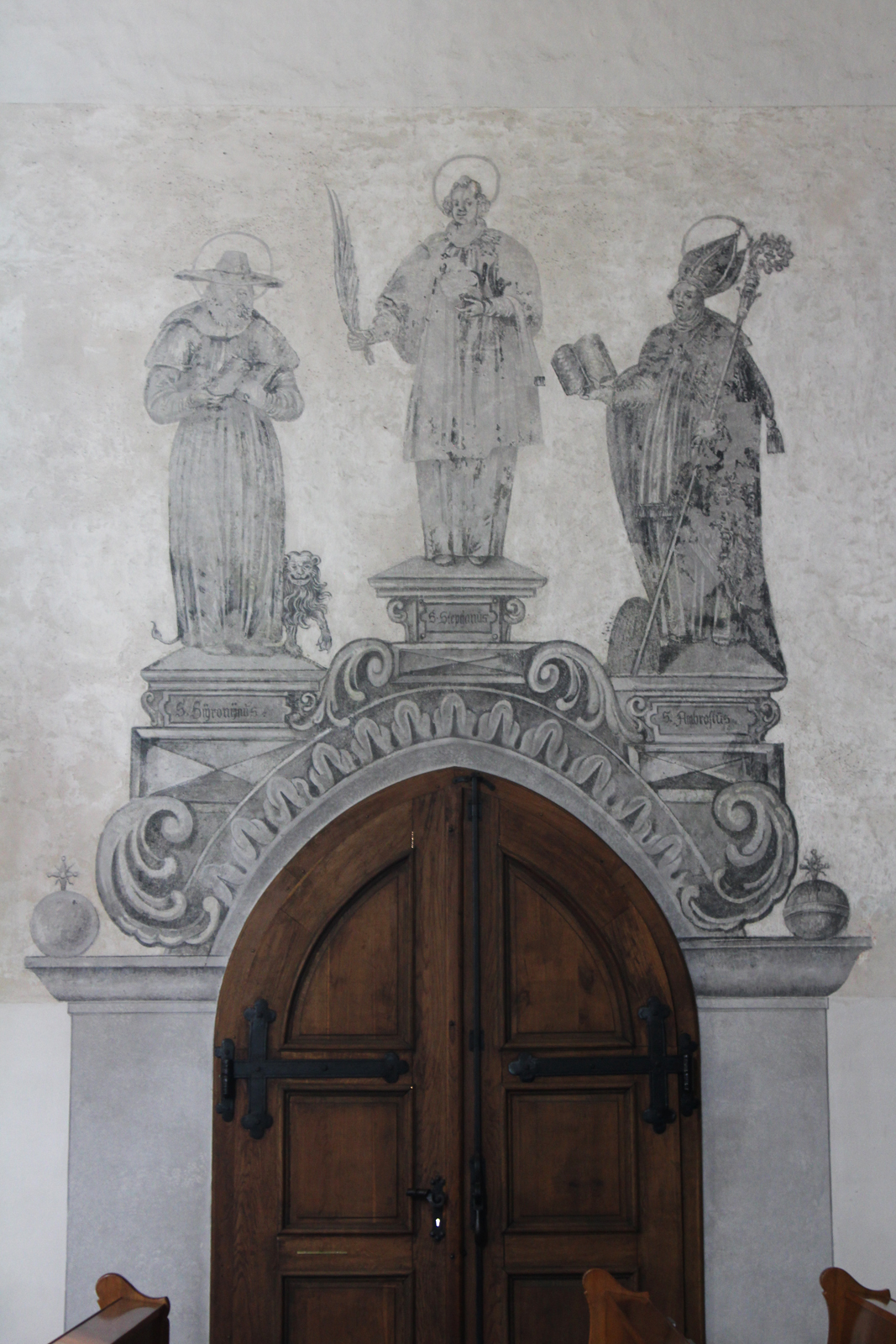 Renaissance Bildfeld in der Pfarrkirche St. Laurentius Altheim, OÖ